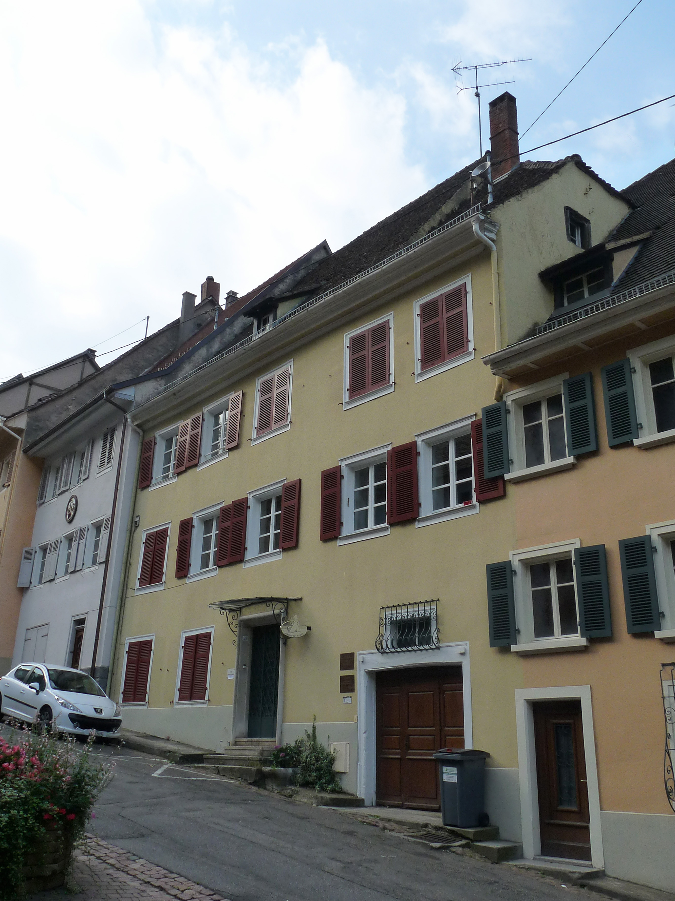 Ferrette (Haut-Rhin), 22 rue du Château. Maison où naquit en 1761 le dramaturge alsacien Schwingdenhammer (Lamartelière) et où le poète breton Eugène Guillevic passa son adolescence.